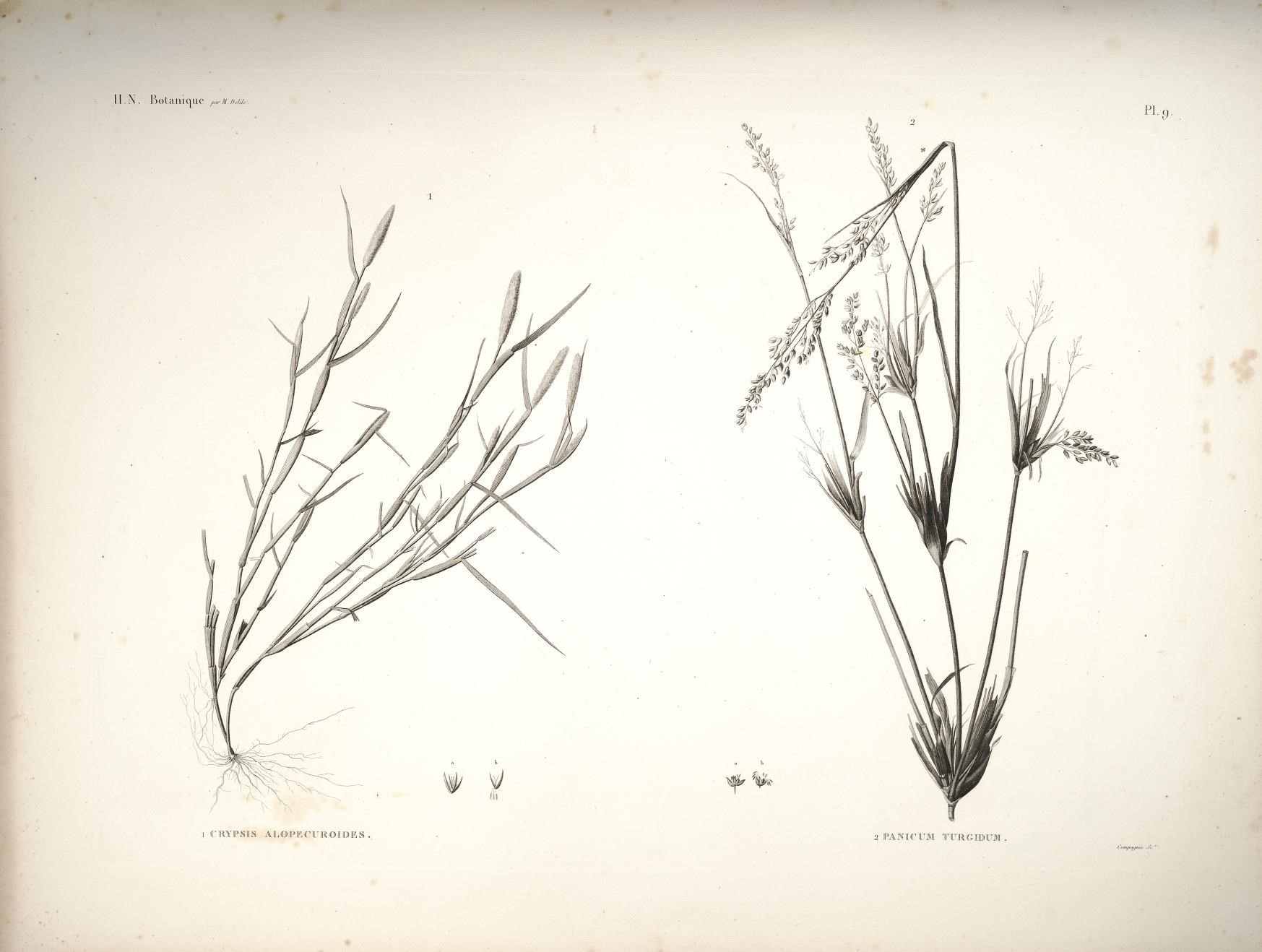 \ 9^ i^ / / / I Il . N . I K) l a 11 1 C